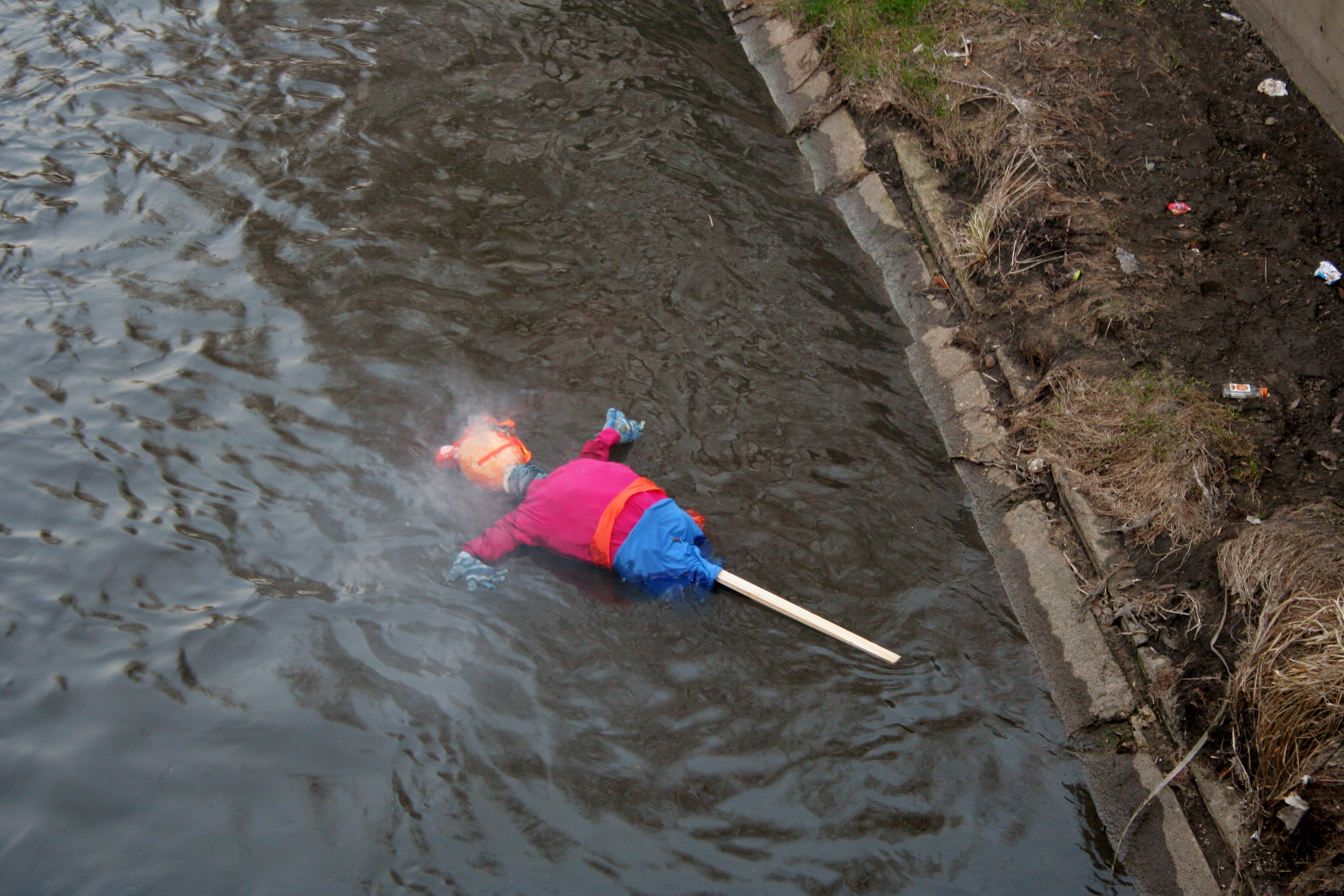 Płynąca Marzanna w Rawie w Katowicach. Podpalona i utopiona przez uczestników spotkania geocaschingowego "Wiosenne spotkanie".